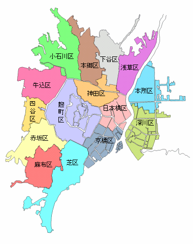 1878年（明治11年）の郡区町村編制法施行当初の東京15区 『実測東京全図』内務省地理局・1878年、『大東京概観』東京市役所・1932年、をもとに作成しました 画像作成者は提供者と同じです 画像作成日：2006年10月ごろ